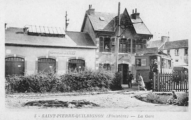 La gare de Saint-Pierre-Quilbignon, sur le tramway de Brest au Conquet (Finistère, France)